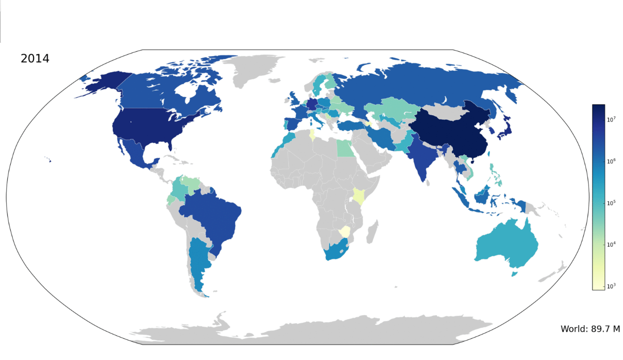 إنتاج المركبات 2014